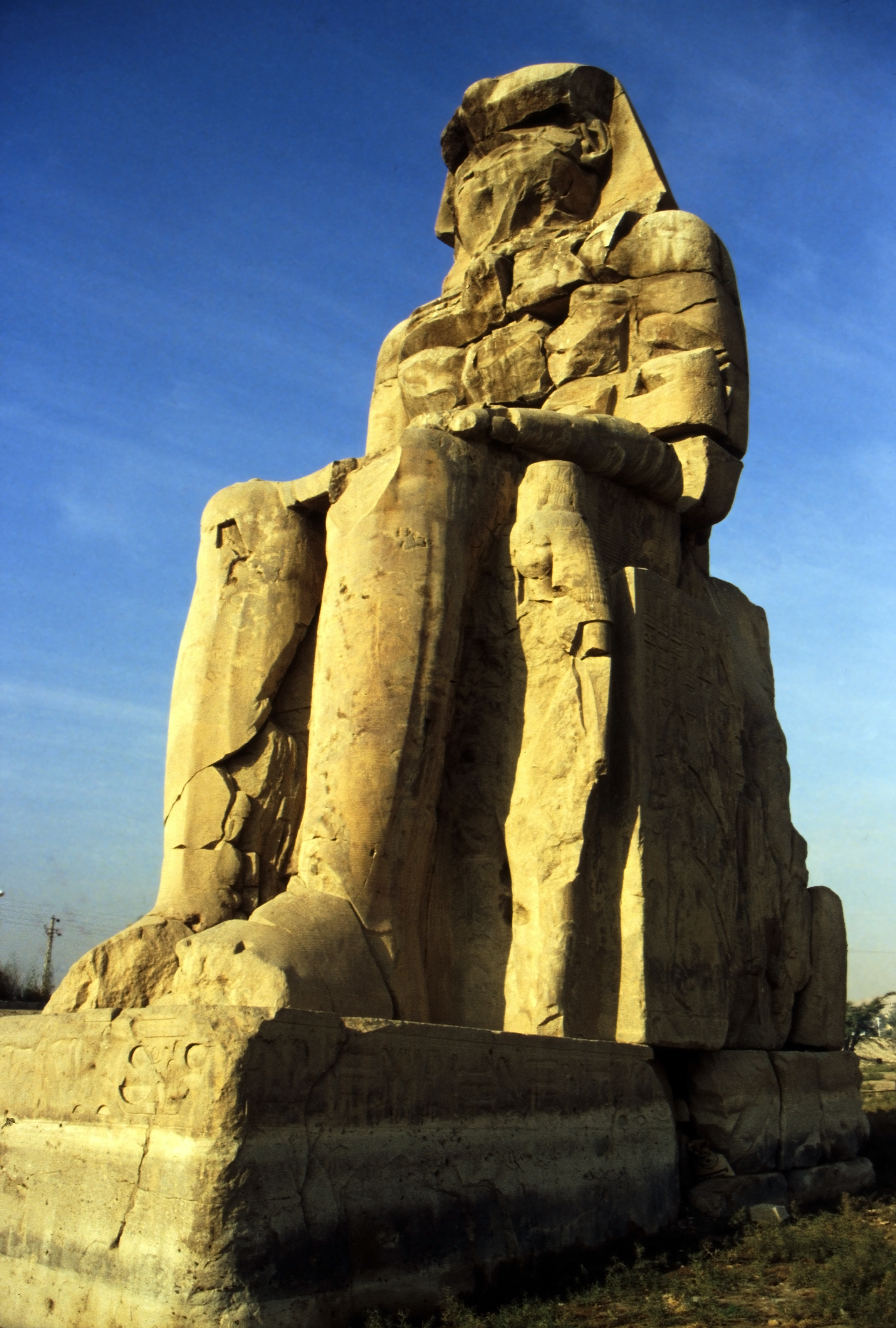 Die nördliche Statue der Memnonkolosse. Zu sehen auch am linken Bein die Mutter des Pharaos Amenophis III., Mutemwia. .